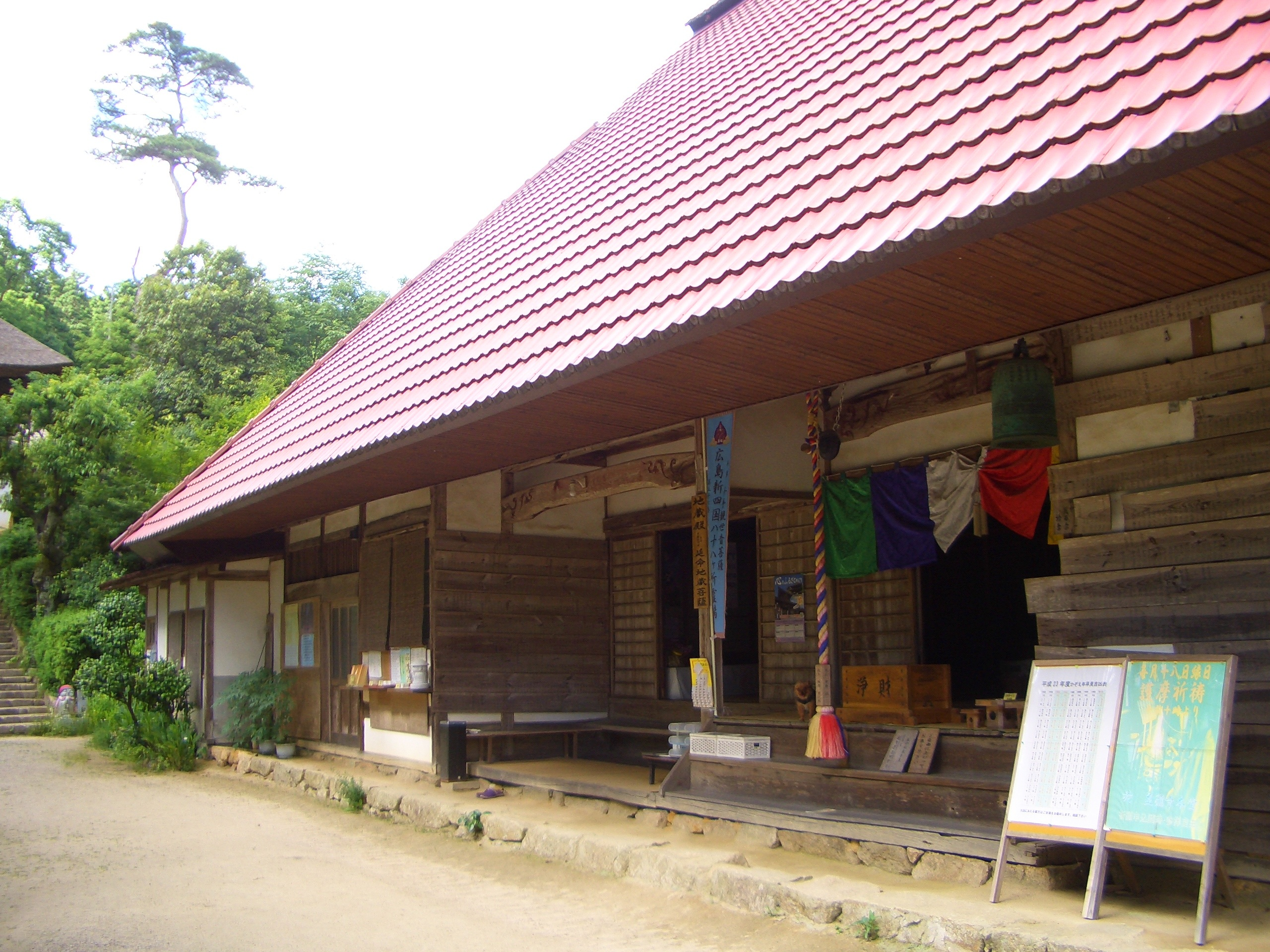 並滝寺の庫裏の写真